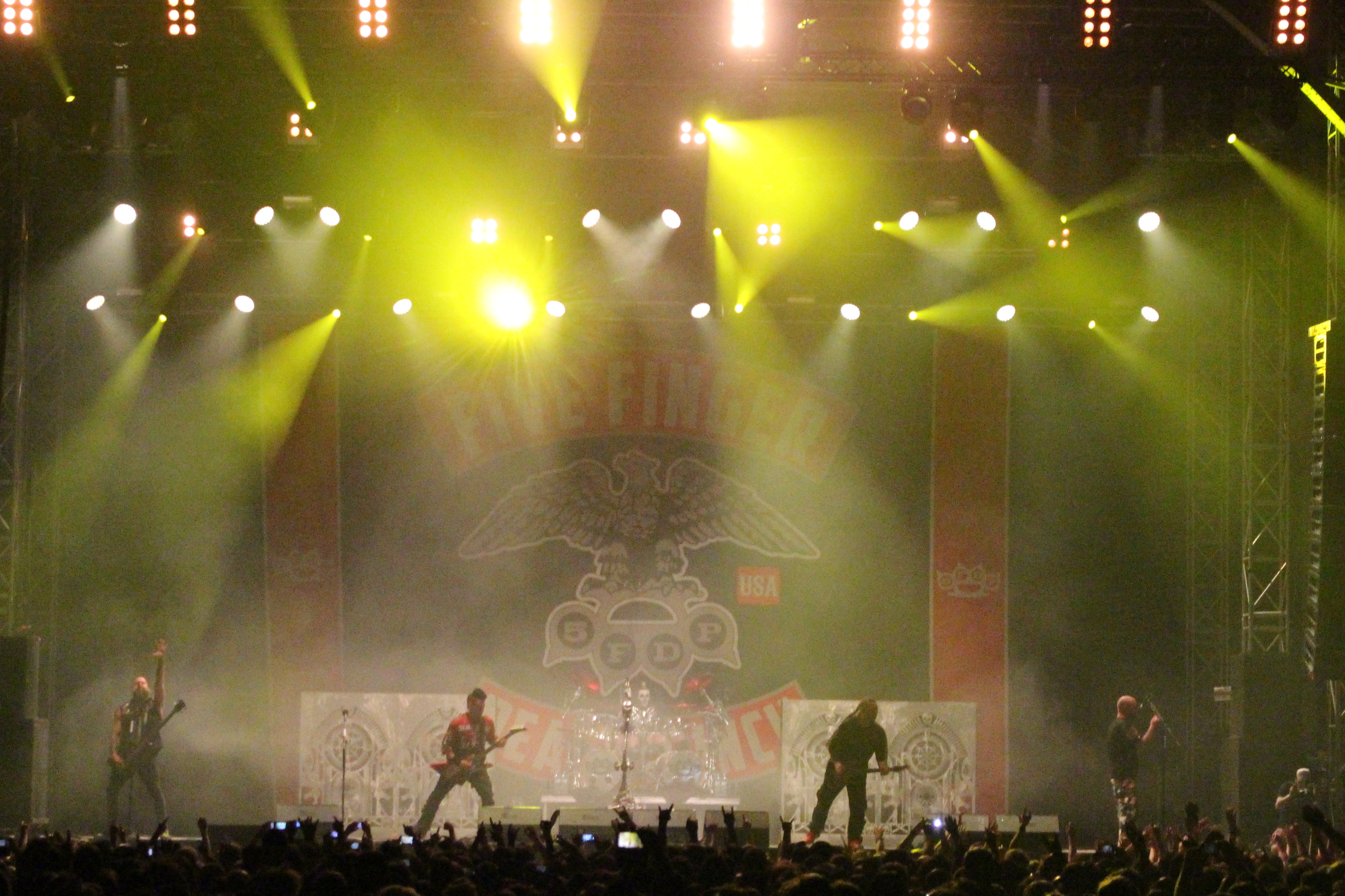 Festivalsommer This photo was created with the support of donations to Wikimedia Deutschland in the context of the CPB project "Festival Summer".